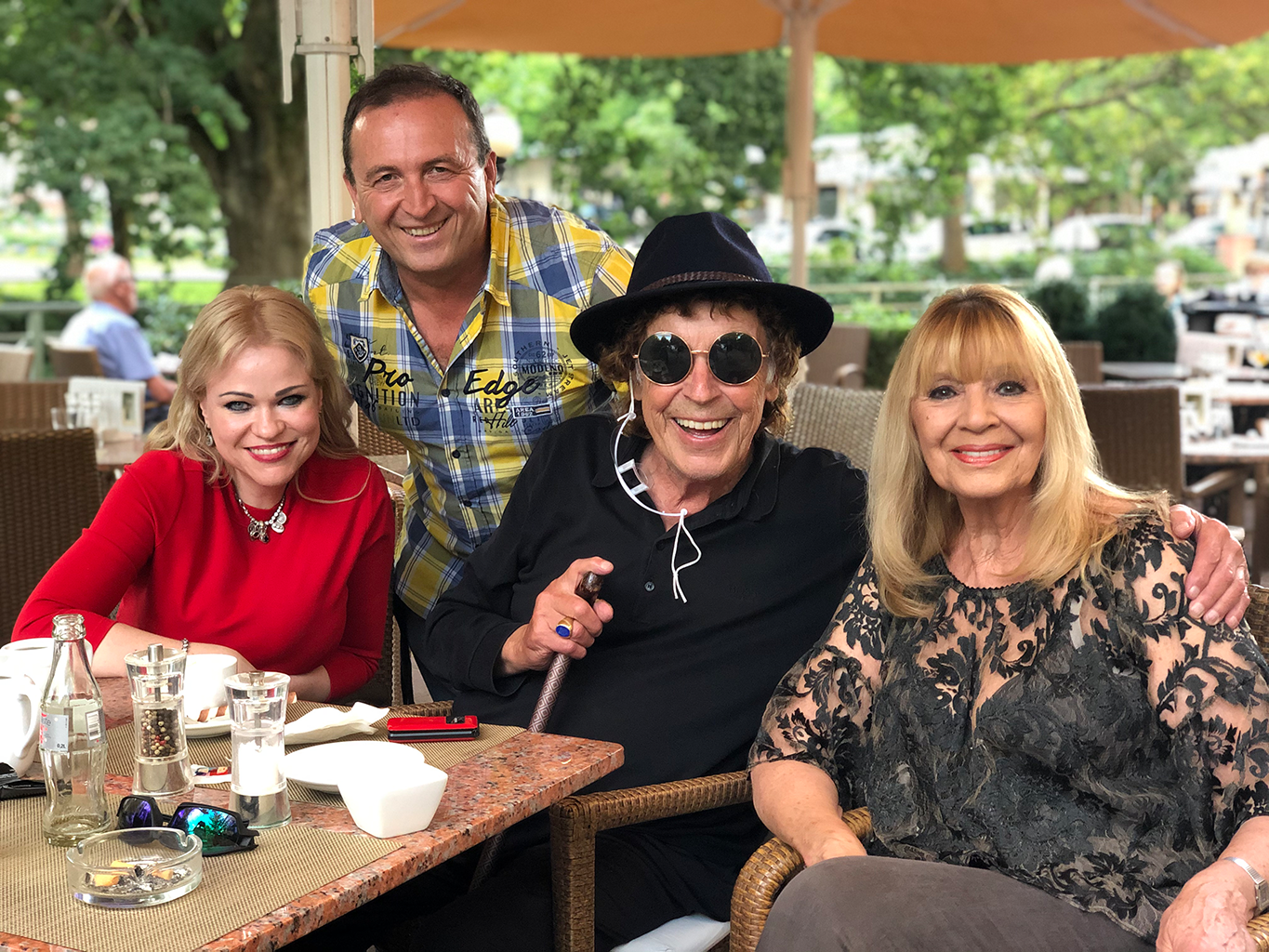 Jennah Karthes gemeinsam mit den Schlagersängern Tony Marshall, Cindy Berger und Tom Erbrecht in Baden-Baden im Juli 2020.